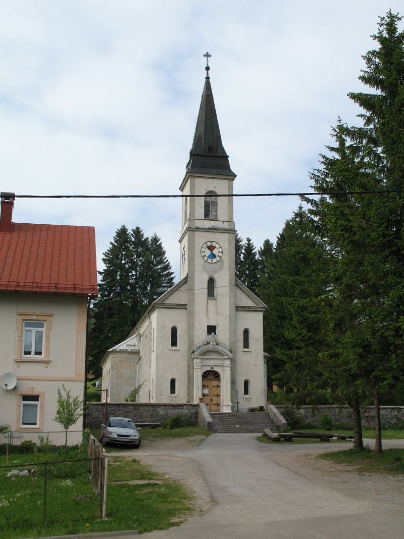 Pogled na Crkvu svete Terezije Avilske u Ravnoj Gori i župni stan s glavne ceste u Ravnoj Gori